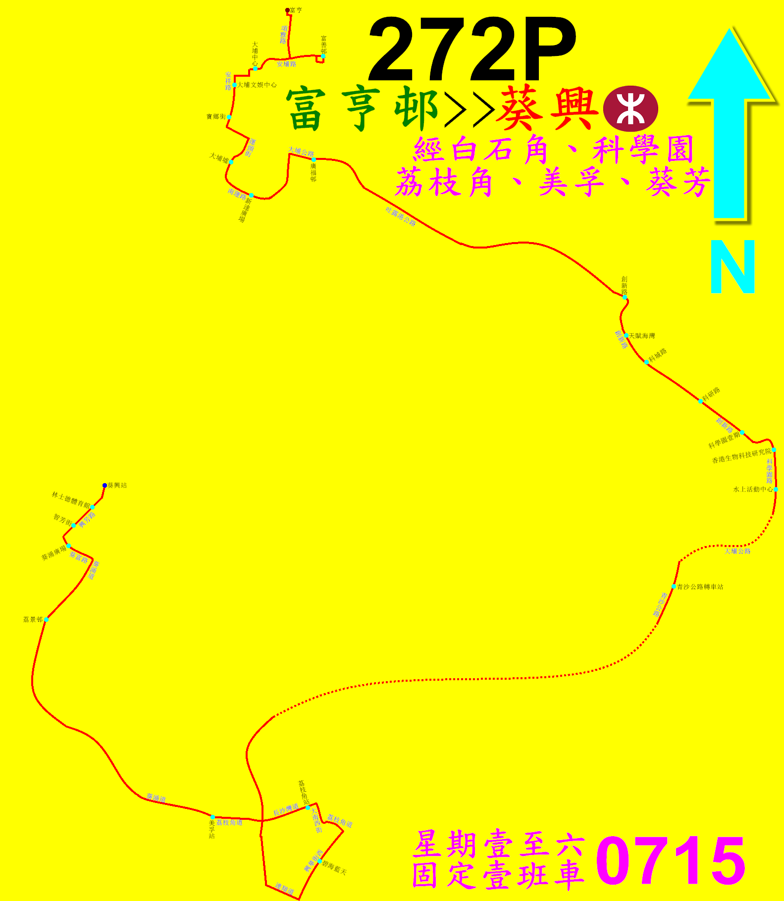 中文（香港）: 九巴272P線的走線圖